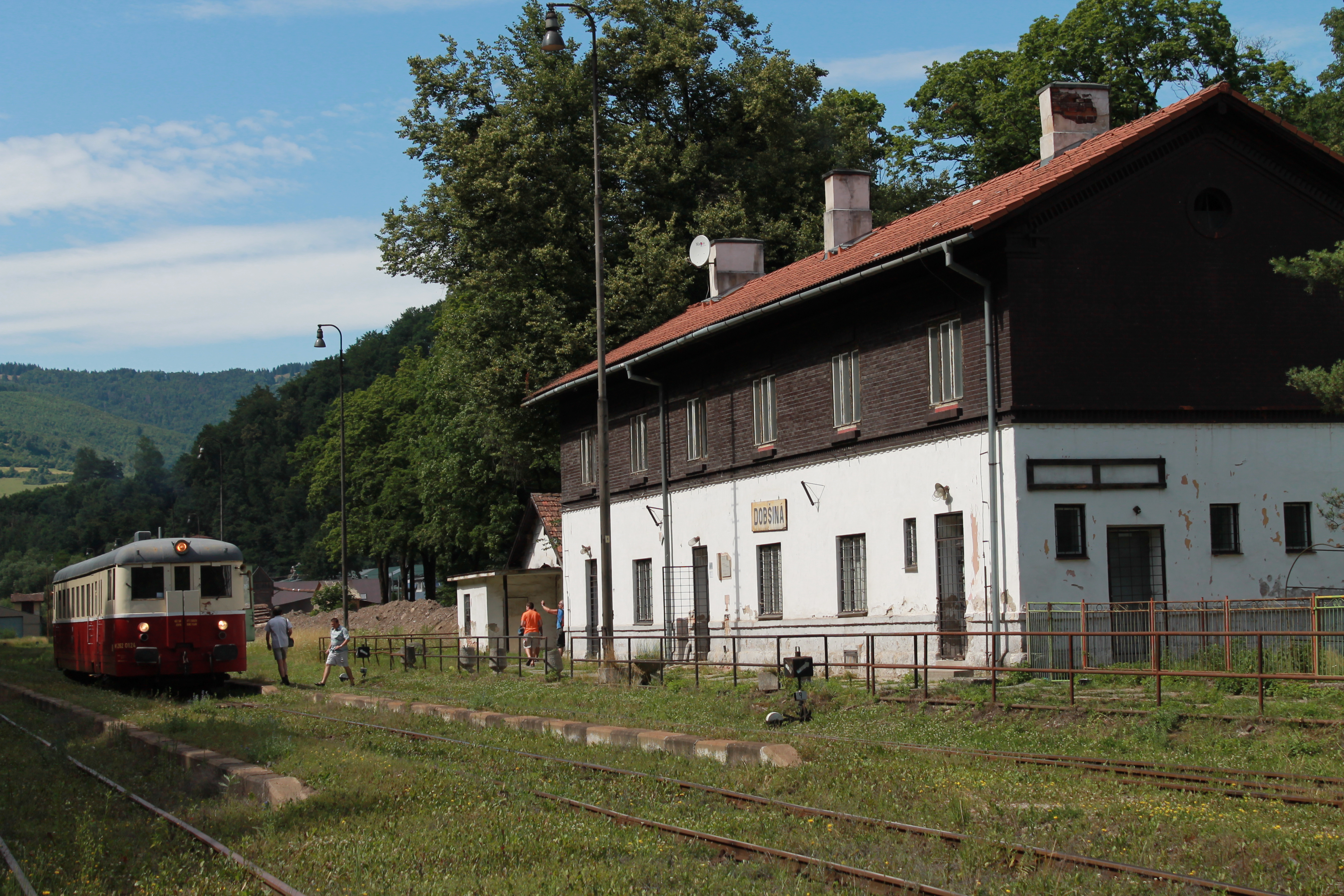 Dobšiná s M262.0124